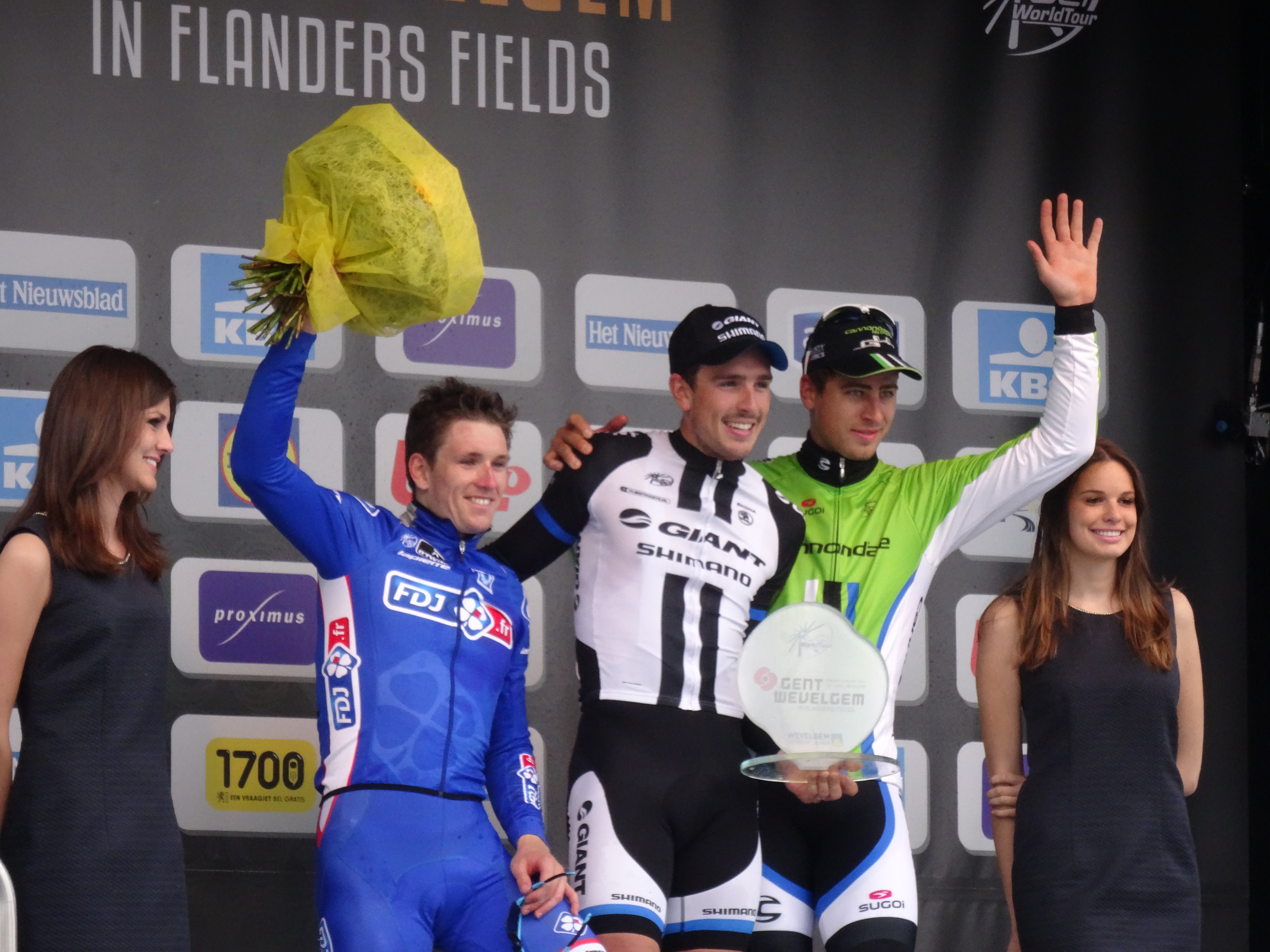 Reportage photographique réalisé le dimanche 30 mars à l'occasion de l'arrivée de Gand-Wevelgem 2014 à Wevelgem, Belgique.